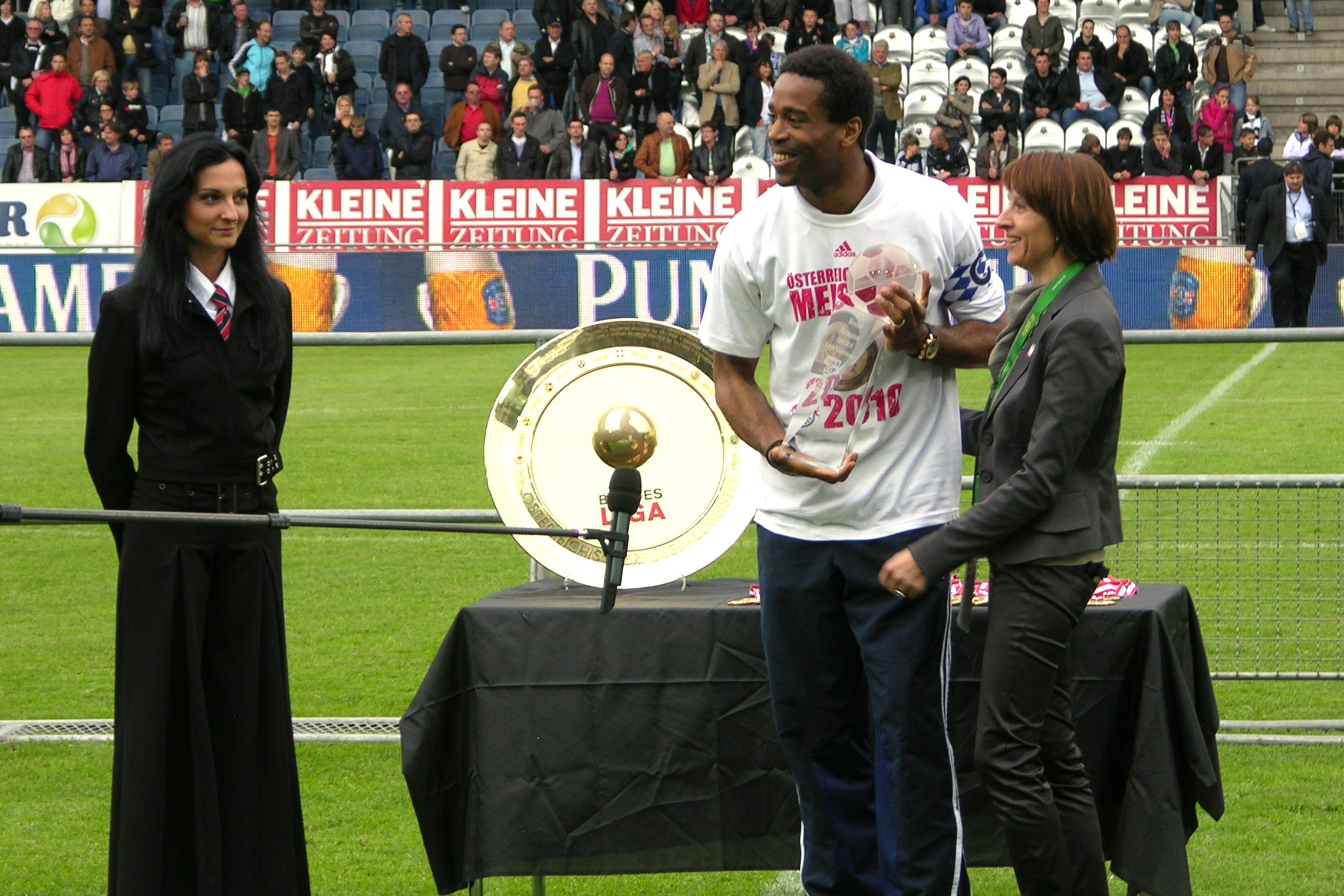 Bundesligameisterschaftsfinale 2009/2010 Sturm : Salzburg